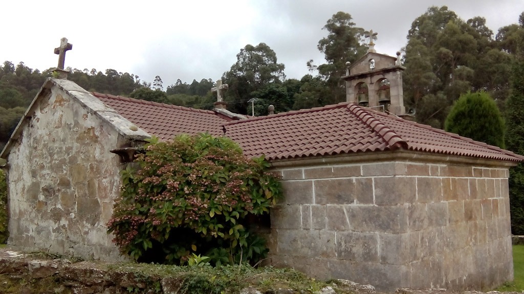 Vista da igrexa de Soutullo, A Laracha.